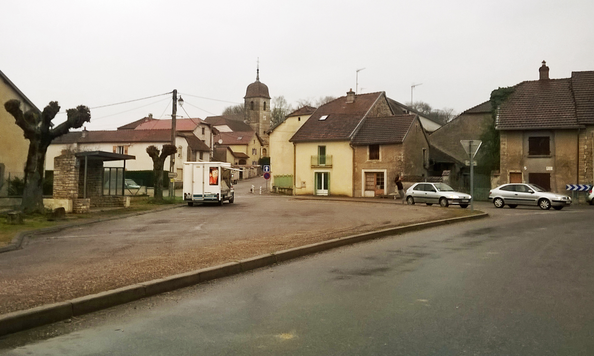 Rosey